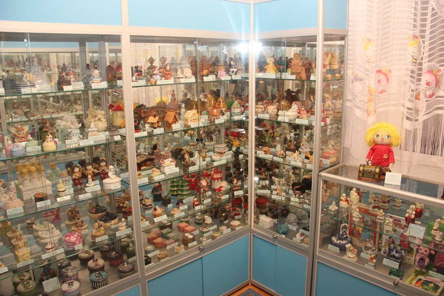 Открытие музея